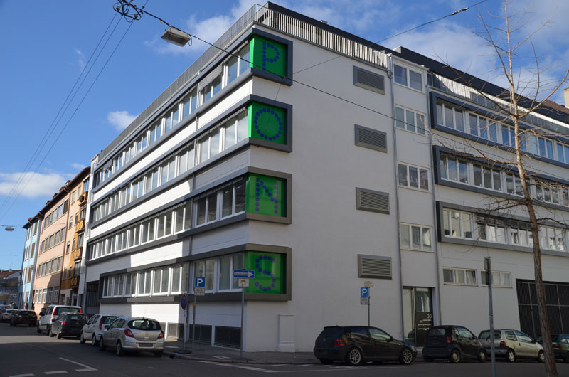 Siedziba PONS GmbH an Stöckachstraße 11 w Stuttgarcie